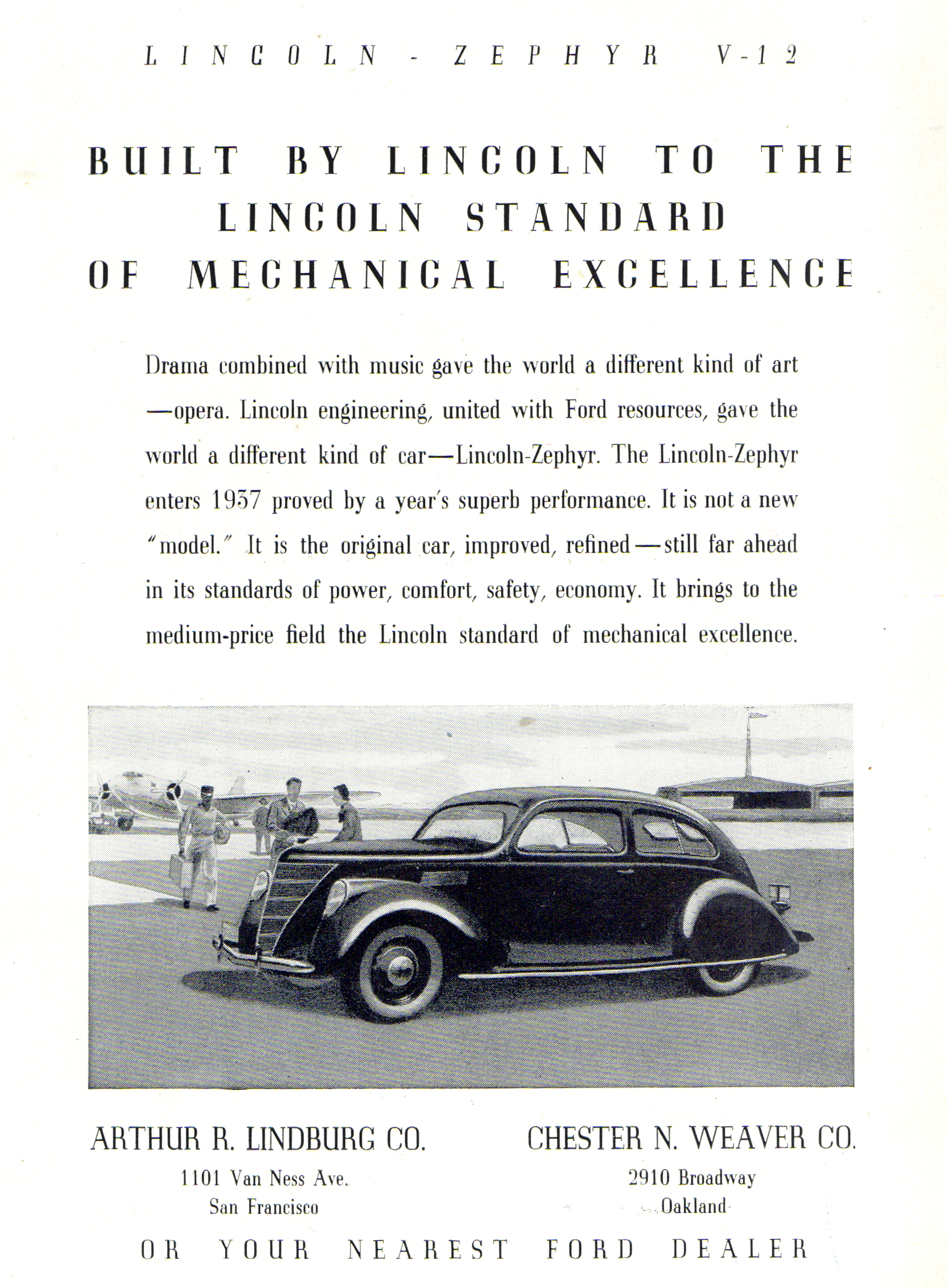 Advertisement for 1937 Lincoln-Zephyr V-12 automobile